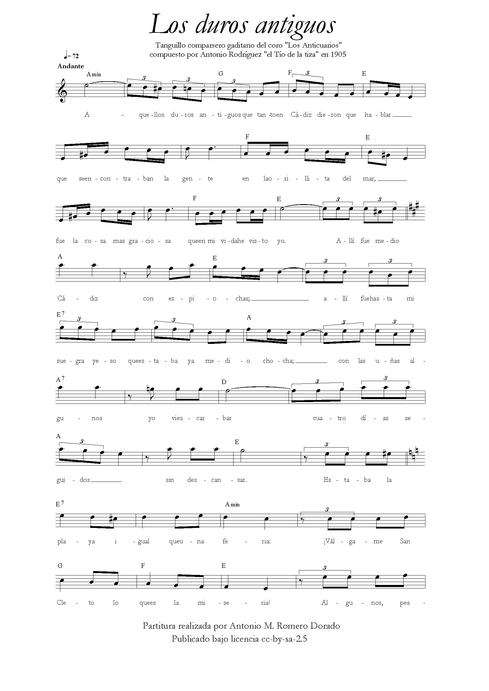 Los duros antiguos (canción popular del carnaval de Cádiz ) / Traditional song from Cadiz). Página 1/2. Page 1/2